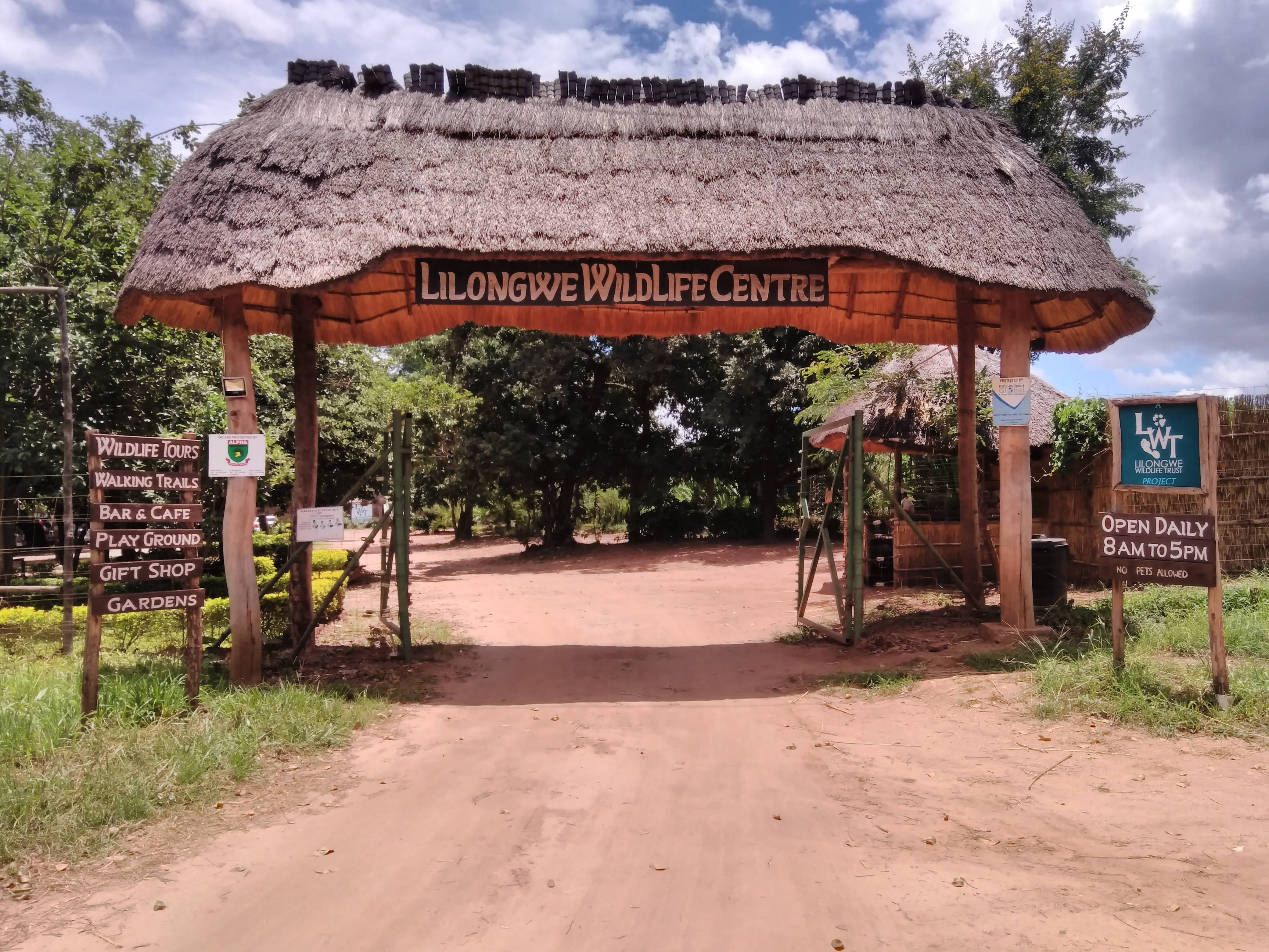 Lilongwe Wildlife Centre